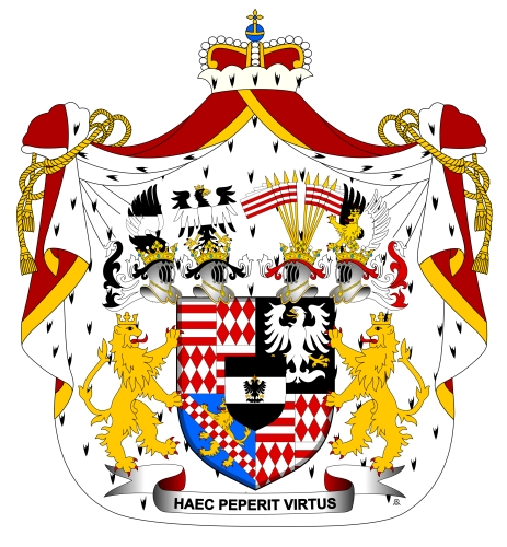 Rodový znak Colloredo-Mansfeld